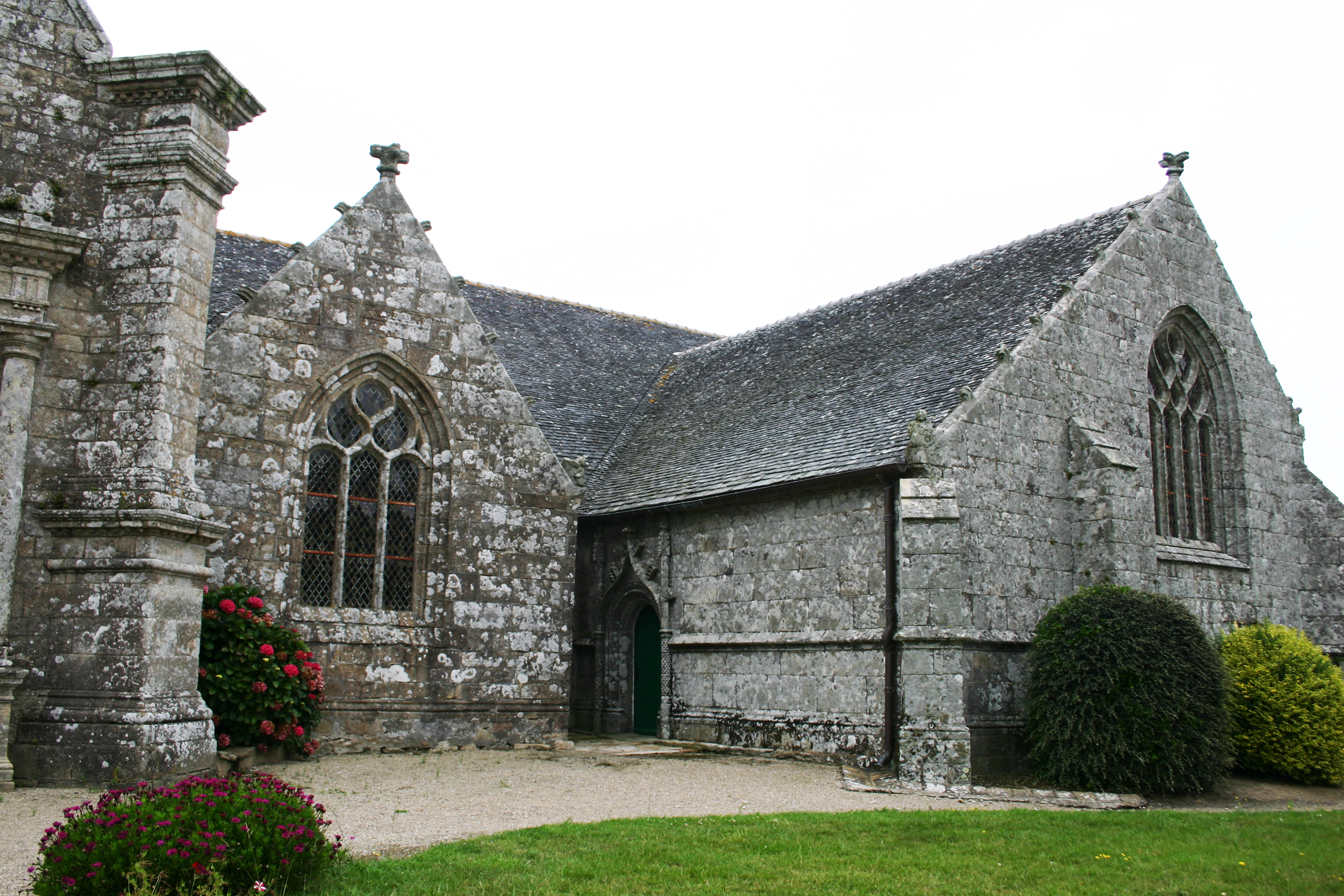 Eglise Notre-Dame-de-la-Clarté-Beuzec-Cap-Sizun-Finistère-Bretagne-France